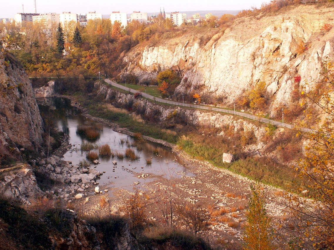 View of Kadzielnia (Kielce, Poland)